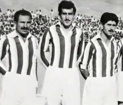 (εξ' αριστερών) Ανδρέας Μουράτης, Μπάμπης Κοτρίδης, Ηλίας Ρωσίδης, εμβηματικοί παίκτες της ομάδας του Ολυμπιακού της δεκαετίας του '50